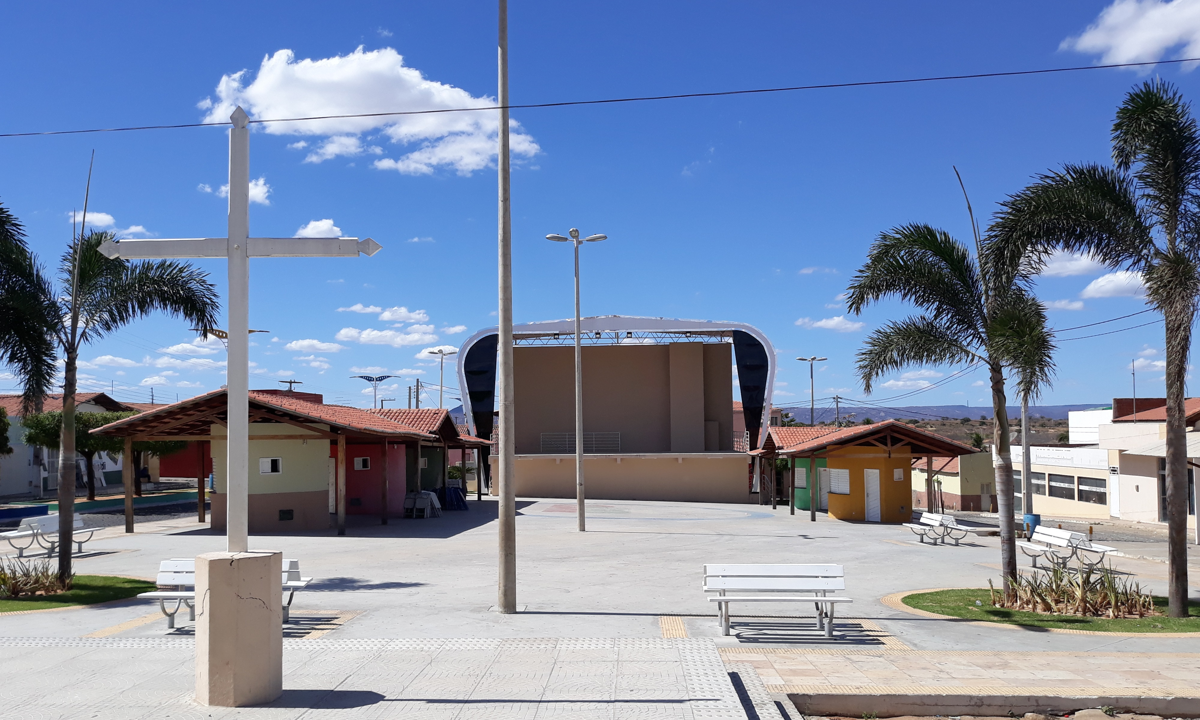 Praça pública de Pilões, Rio Grande do Norte (Brasil), com o Palco de Eventos Ediglei Rodrigues da Silva ao fundo.